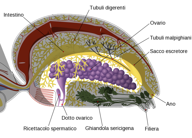 Evidenziazione degli organi riproduttivi di una femmina Araneae